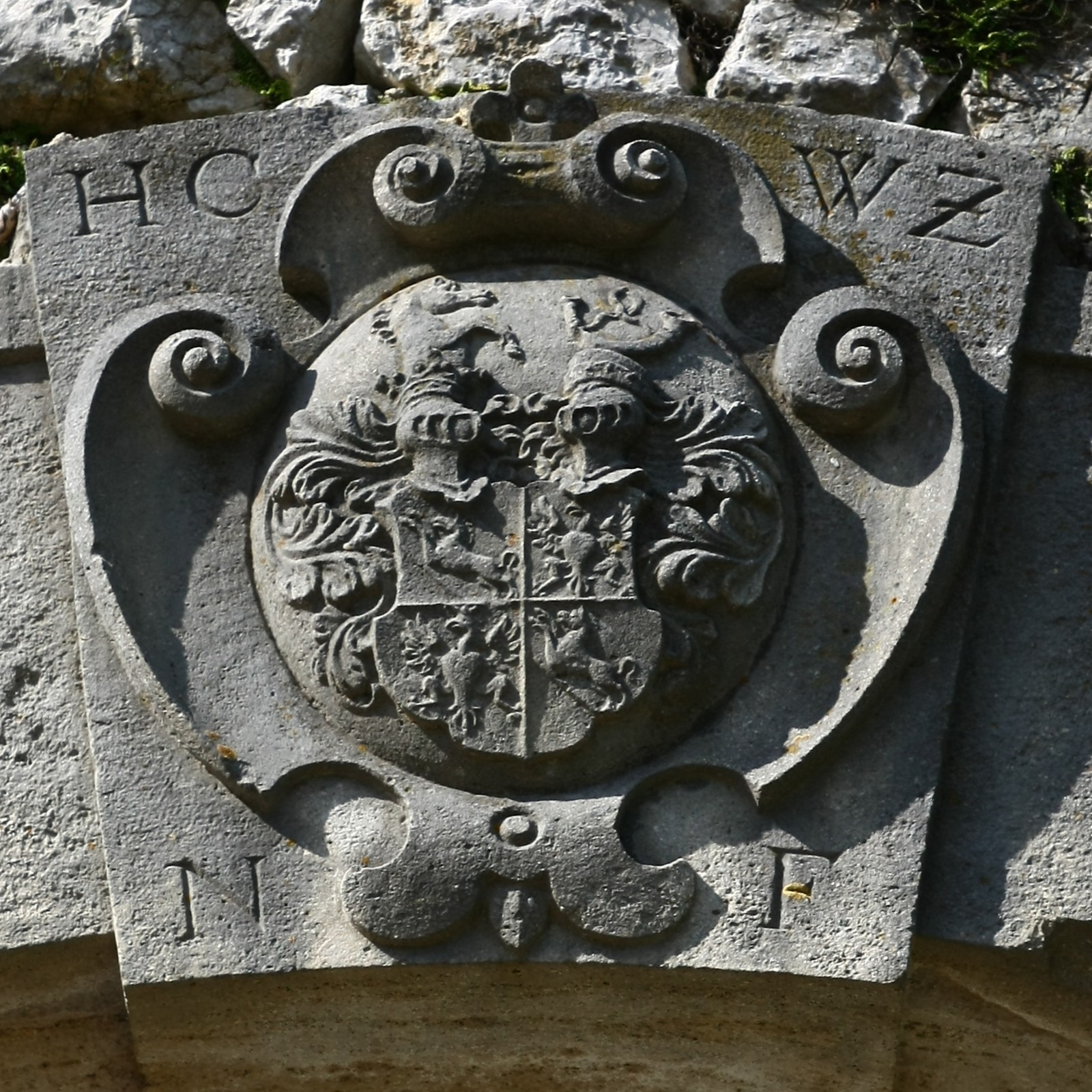 Wappen über der Einfahrt zur Burganlage der Burg Neuhaus auf der Ostseite, die Initialen HCWZNF bedeuten: Hans Christoph Freiherr von Wolzogen zu Neuhaus, Neuhaus (Gemeinde Weissenbach an der Triesting), Wienerwald, Österreich